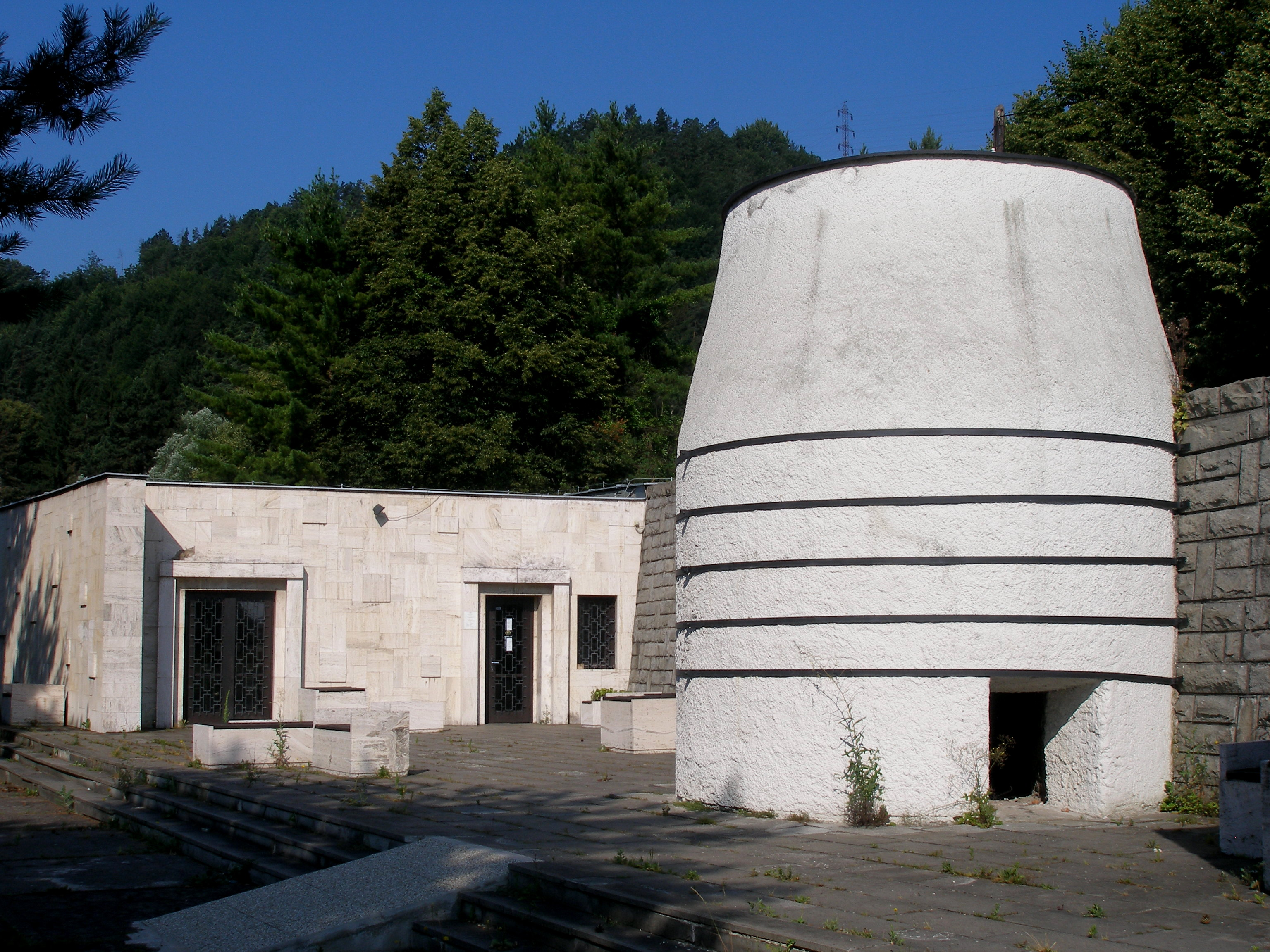 Pamätná izba a vápenná pec. Podľa projektu architektov A. Béllu, E. Stančíka, M. Belluša a akademických sochárov K. Patakiovej a A. Viku bol obetiam fašistických represálií postavený pomník - Pamätník SNP Nemecká.